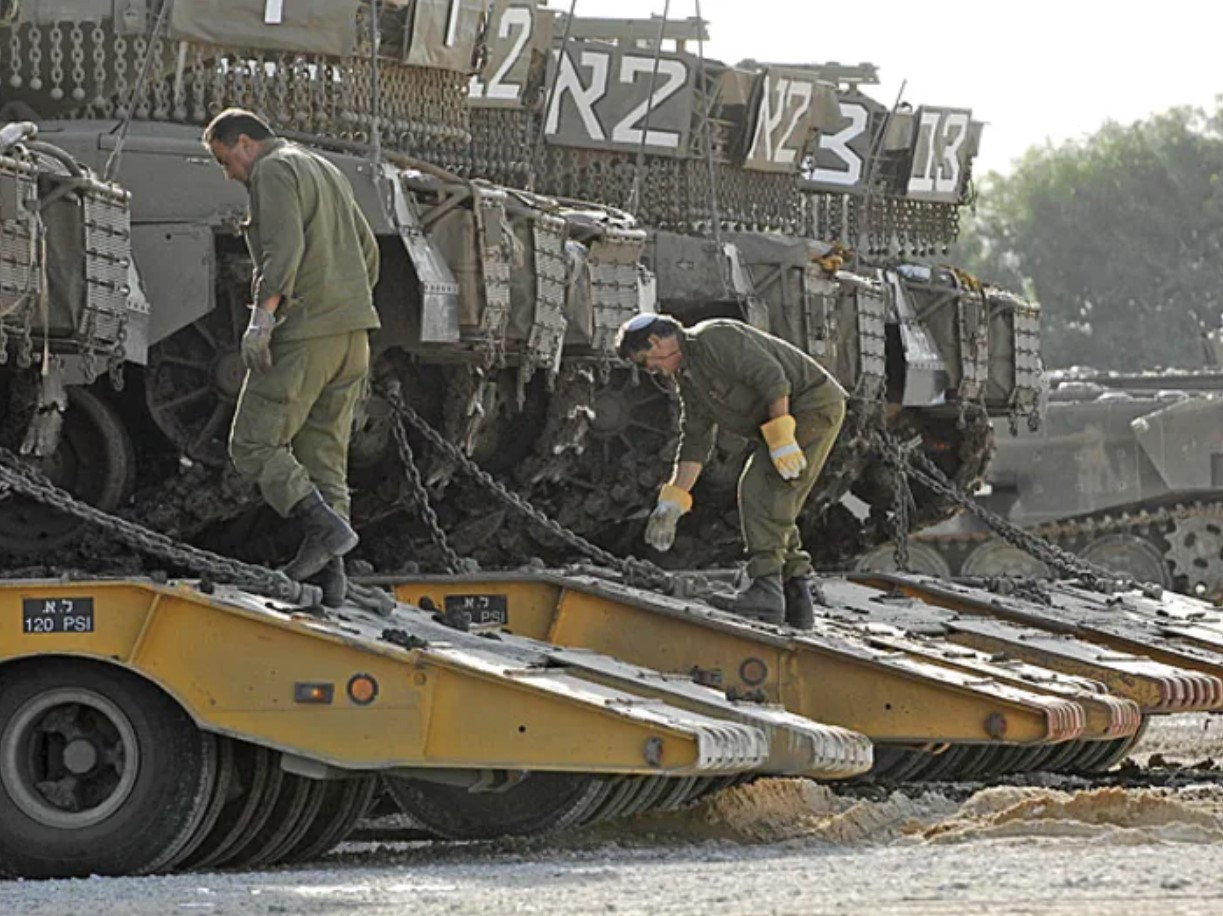 מבצע עופרת יצוקה.